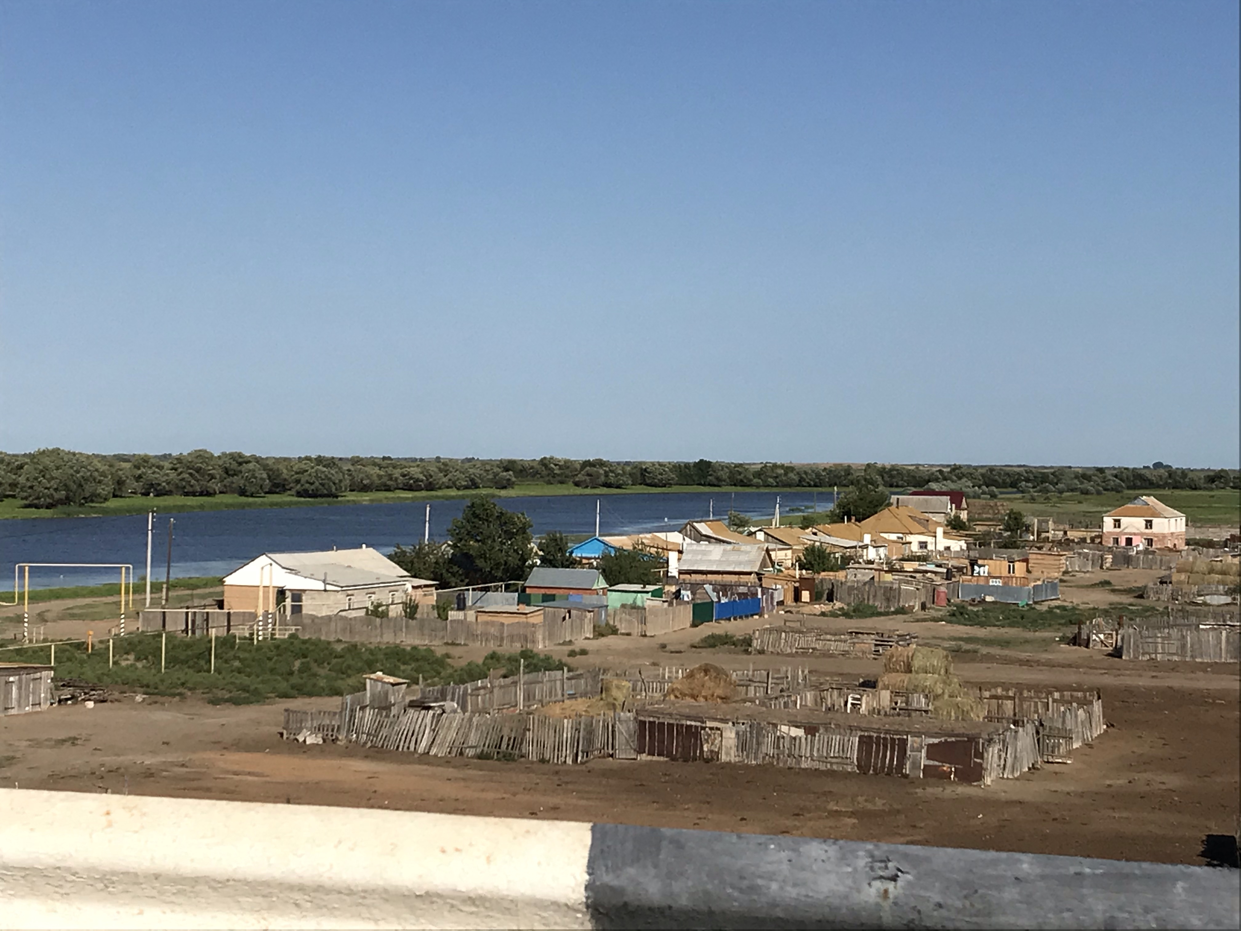 Вид на посёлок Старый Алтынжар с моста через реку Камардан